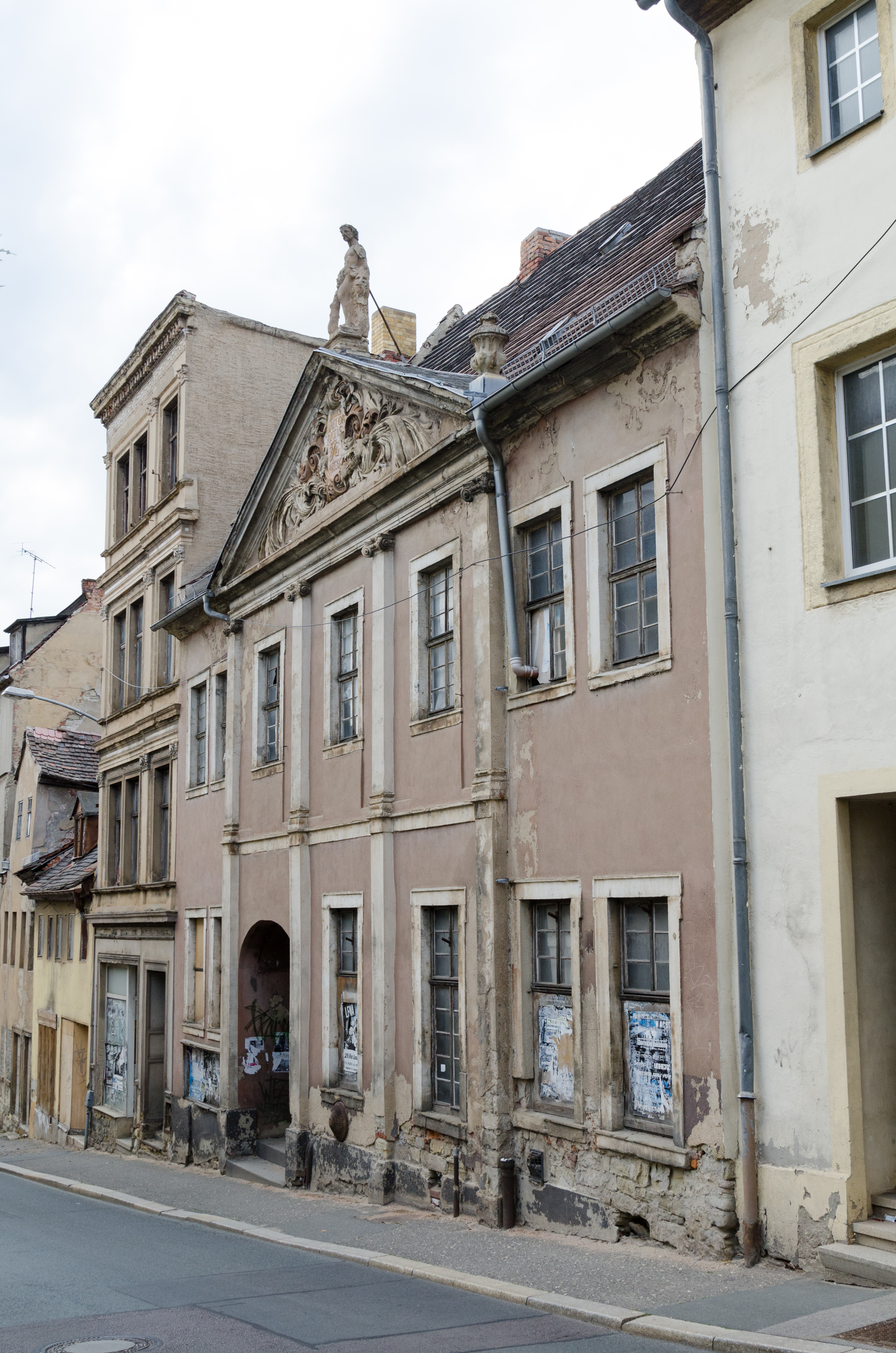 Zeitz, Rahnestraße 11